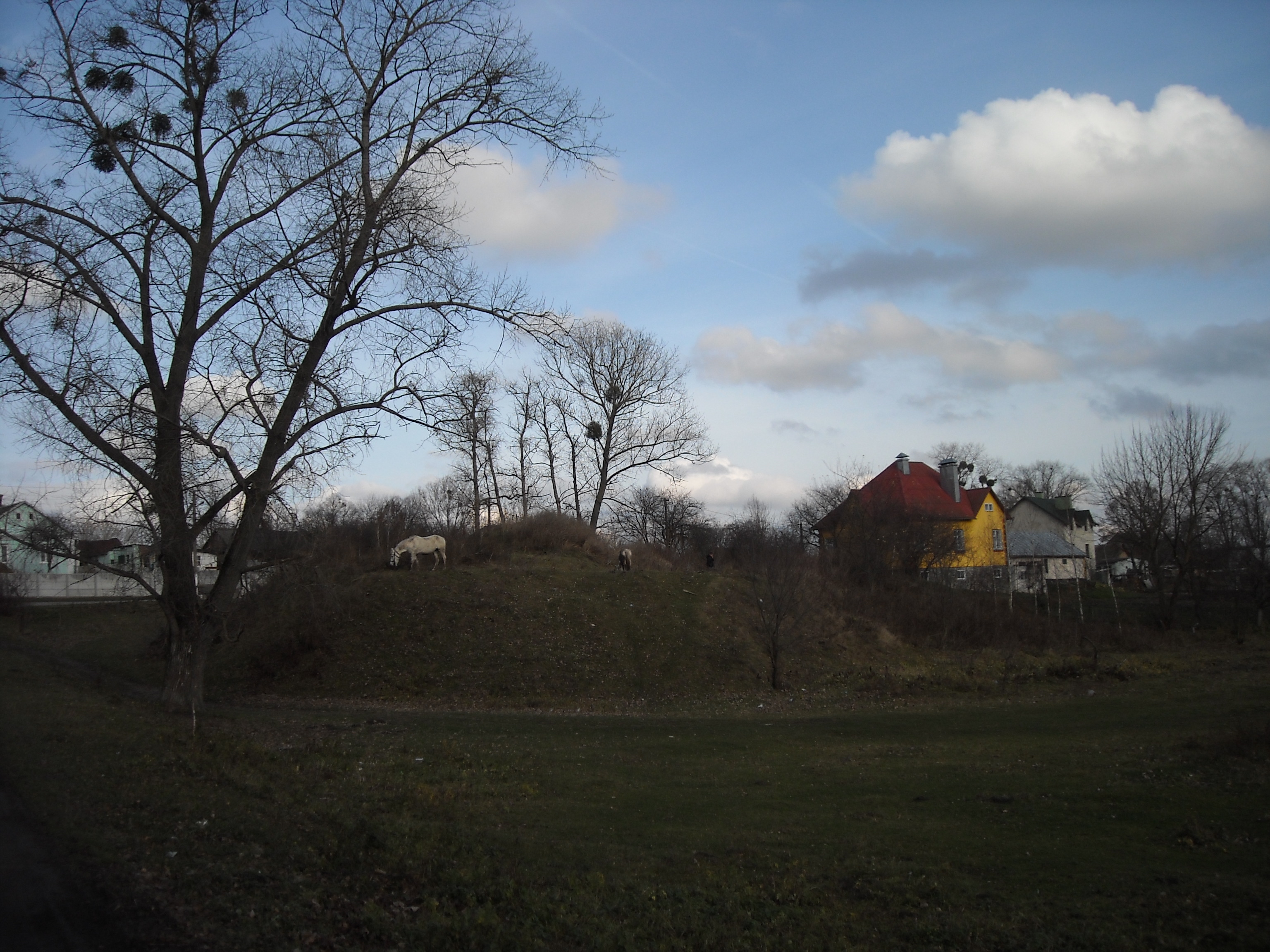 Укріплення Рогачівка,історичне місце с. Омеляна